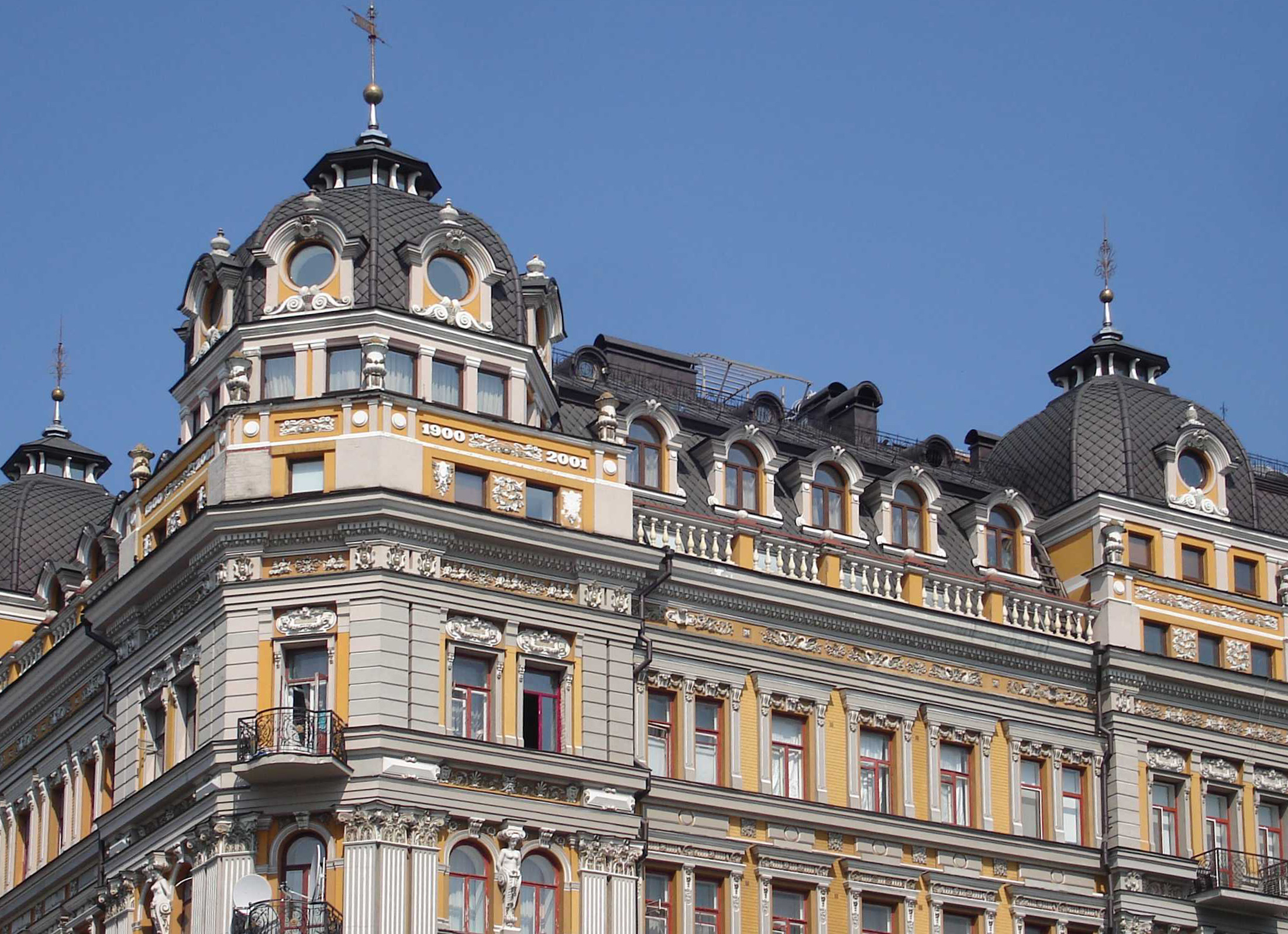 Бывший дом Самонова по ул.Богдана Хмельницкого в Киеве